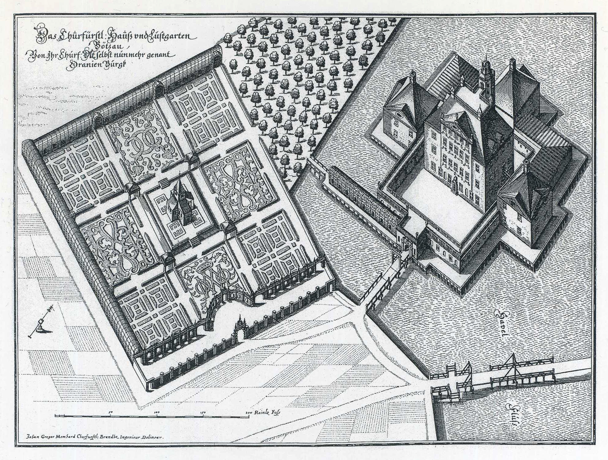 Gesamtansicht des Schlosses der Kurfürstin Louise Henriette. Kupferstich aus Merians Topographie.